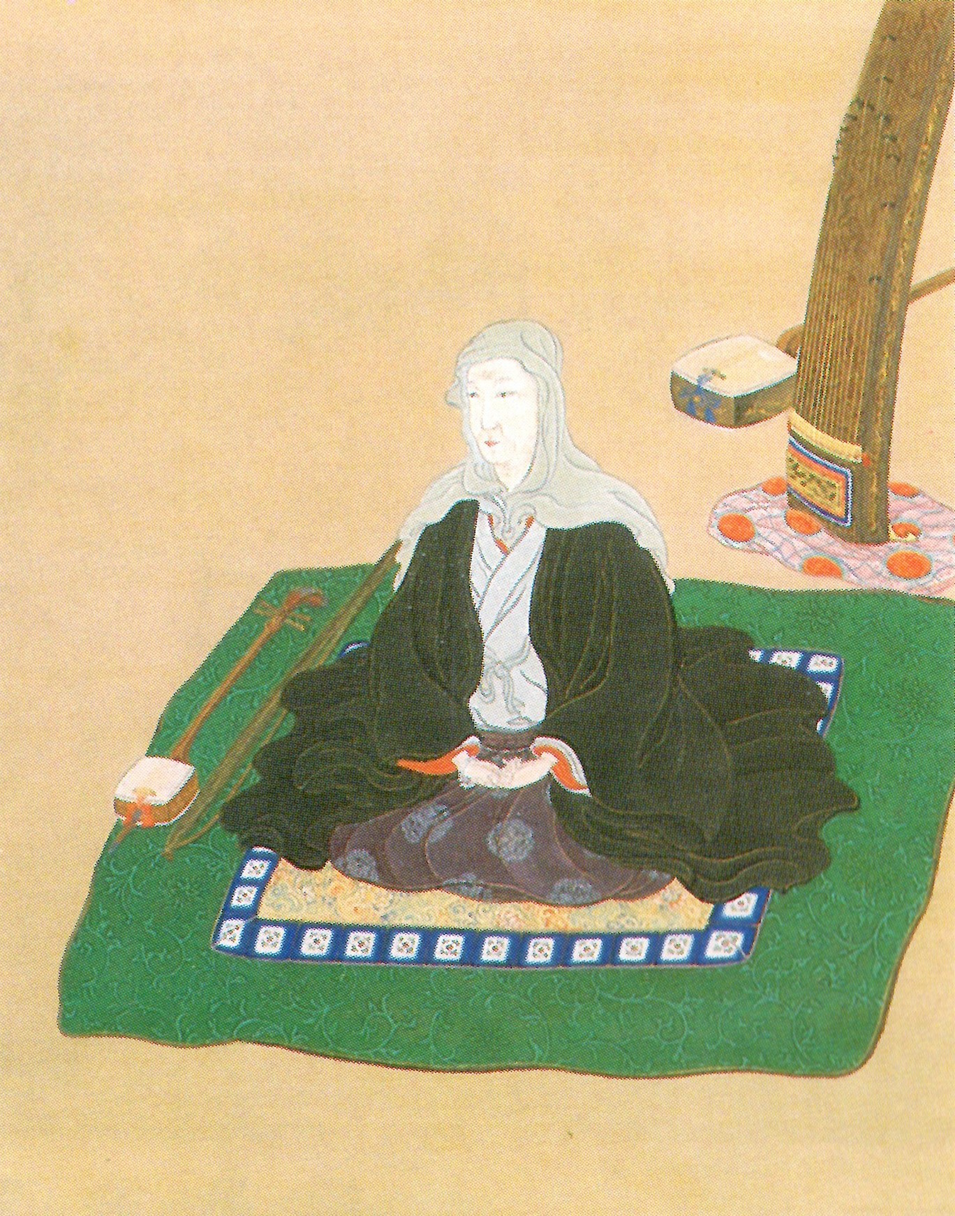 円諦院(淑姫、鍋島重茂の継室、田安宗武の娘)の肖像。